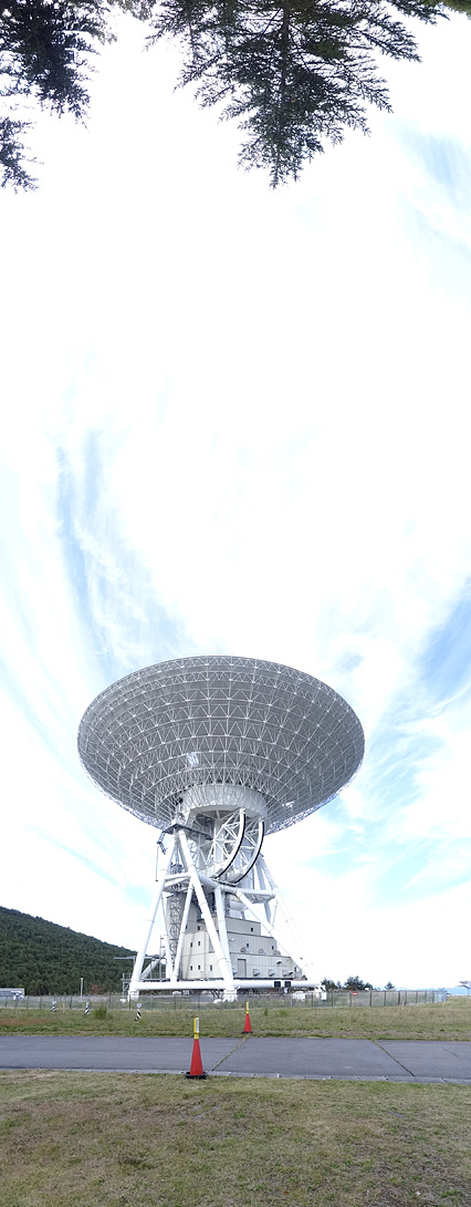 JAXA 臼田宇宙空間観測所 行方不明となり運用放棄寸前だった「はやぶさ」からの信号を最初に補足したアンテナ。 垂直パノラマ写真で背後の木が写っています。